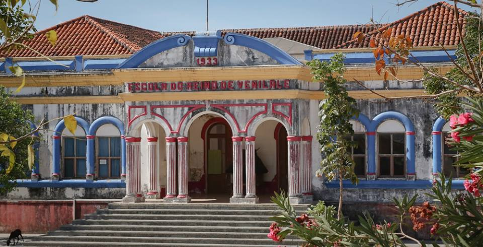 A linda escola de Venilale.